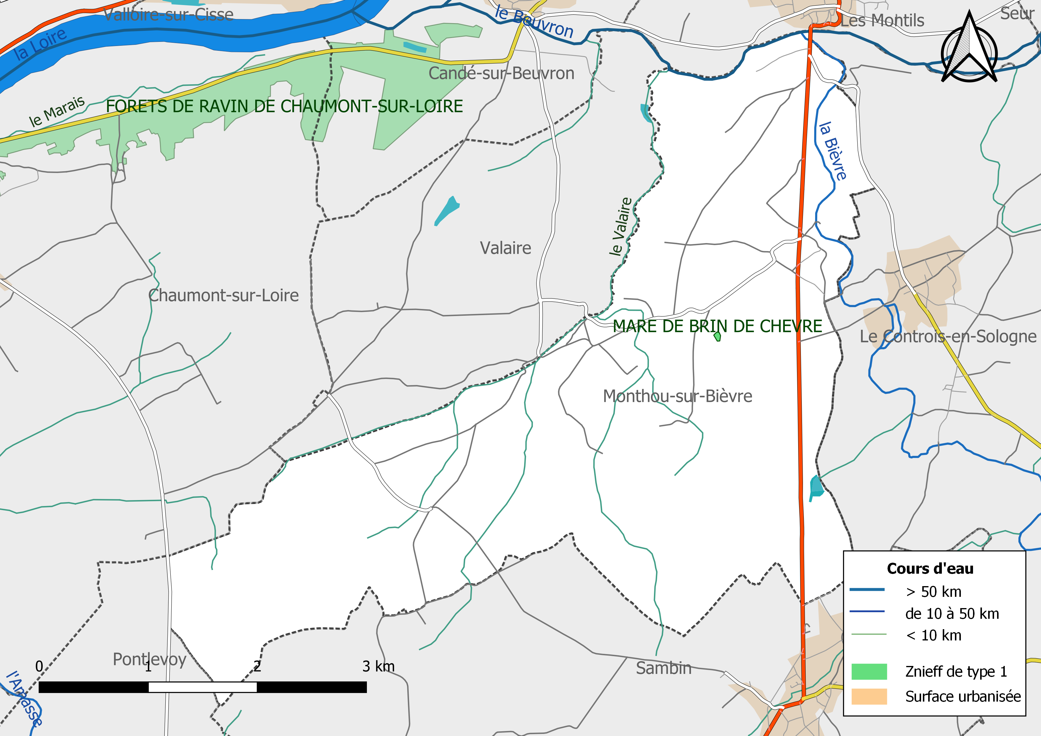 Zones naturelles d'intérêt écologique faunistique et Floristique (ZNIEFF) de type 1 de la commune de Monthou-sur-Bièvre. (Loir-et-Cher, France).